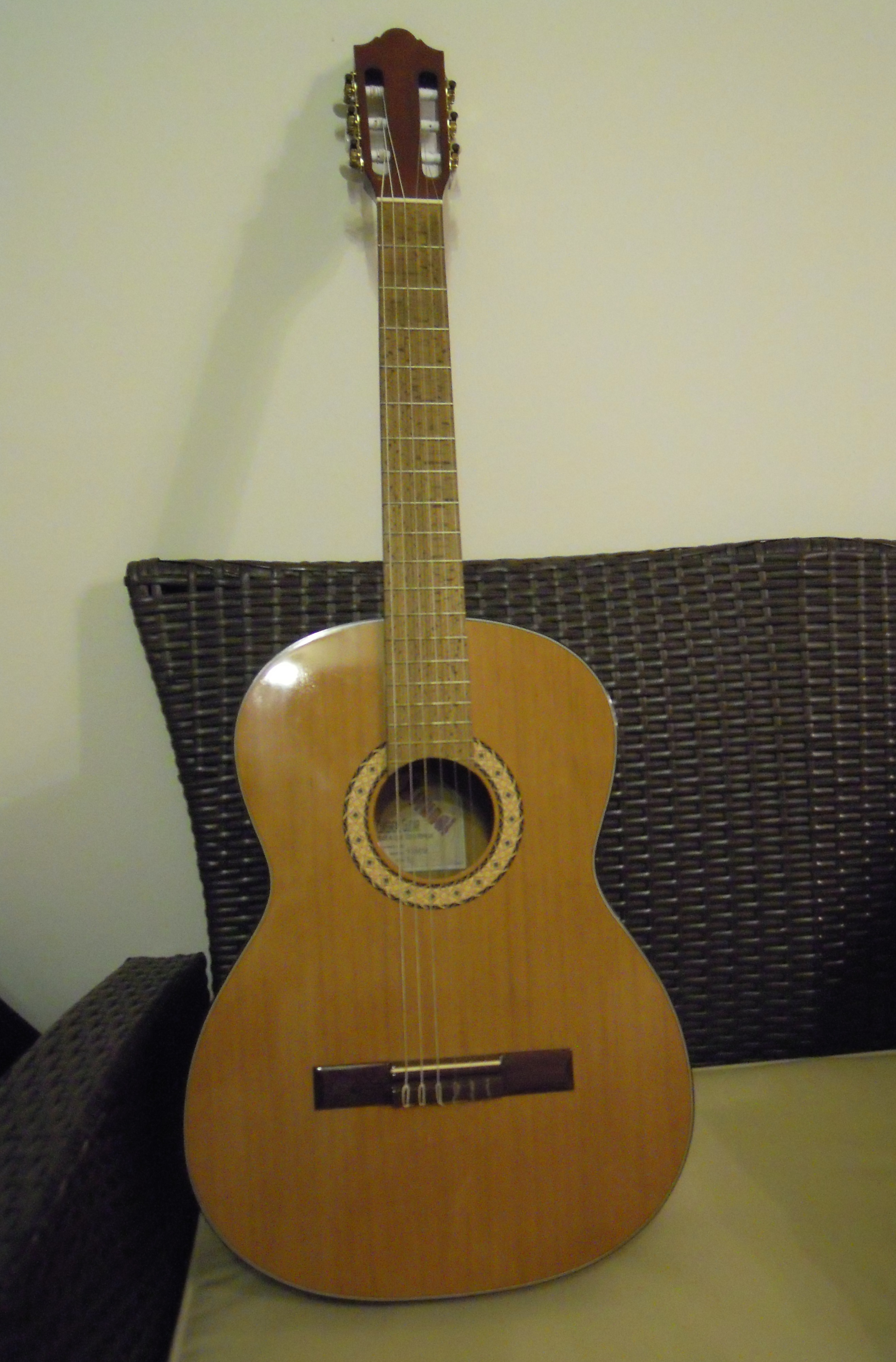 akustická kytara